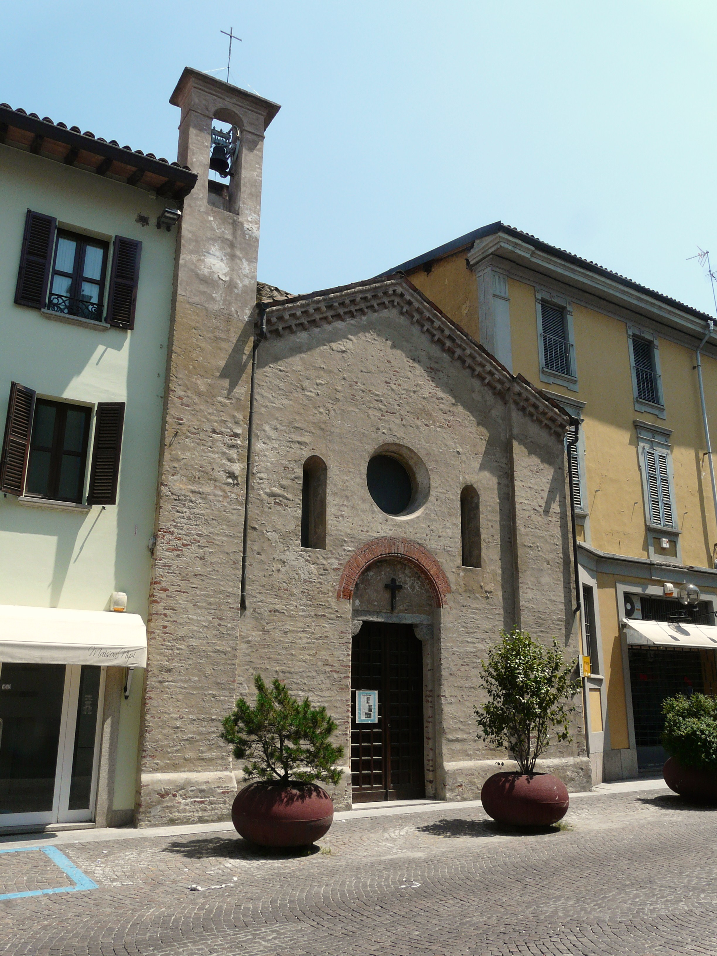 Chiesa di San Giorgio, Vigevano, Lombardia, Italia